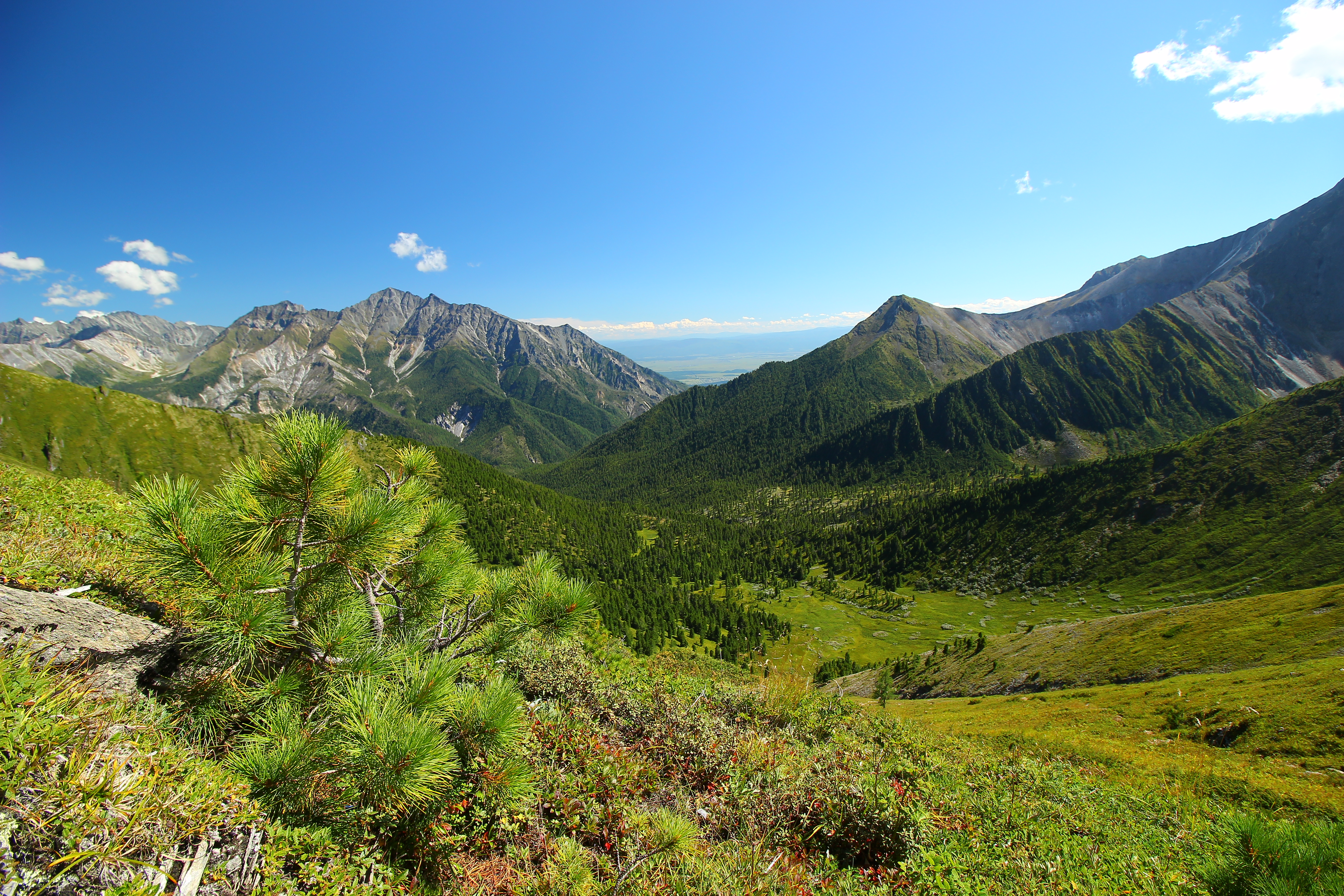 Курорт Аршан: Тункинский район, Бурятия This image is related to the protected area of Russia number 0310113